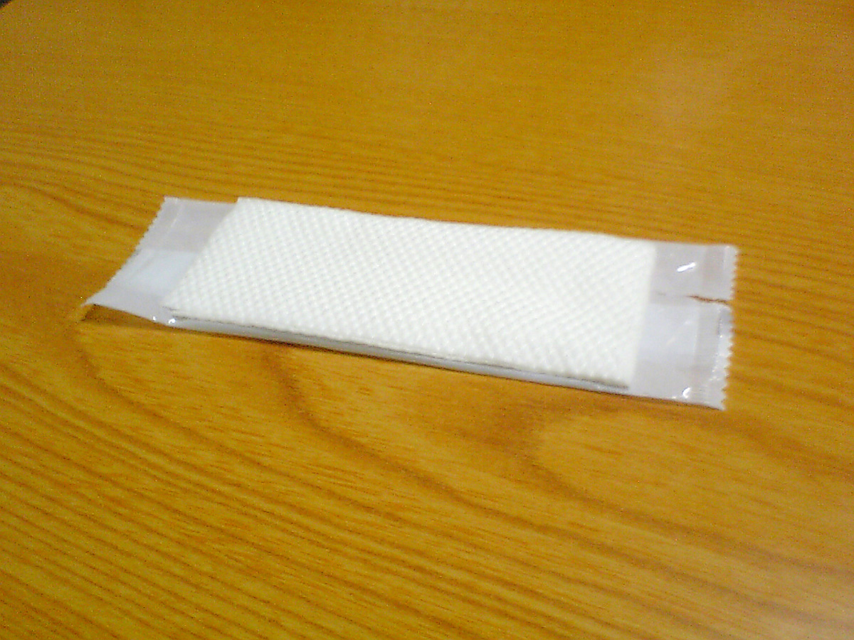 紙製おしぼり Oshibori (おしぼり) made from paper